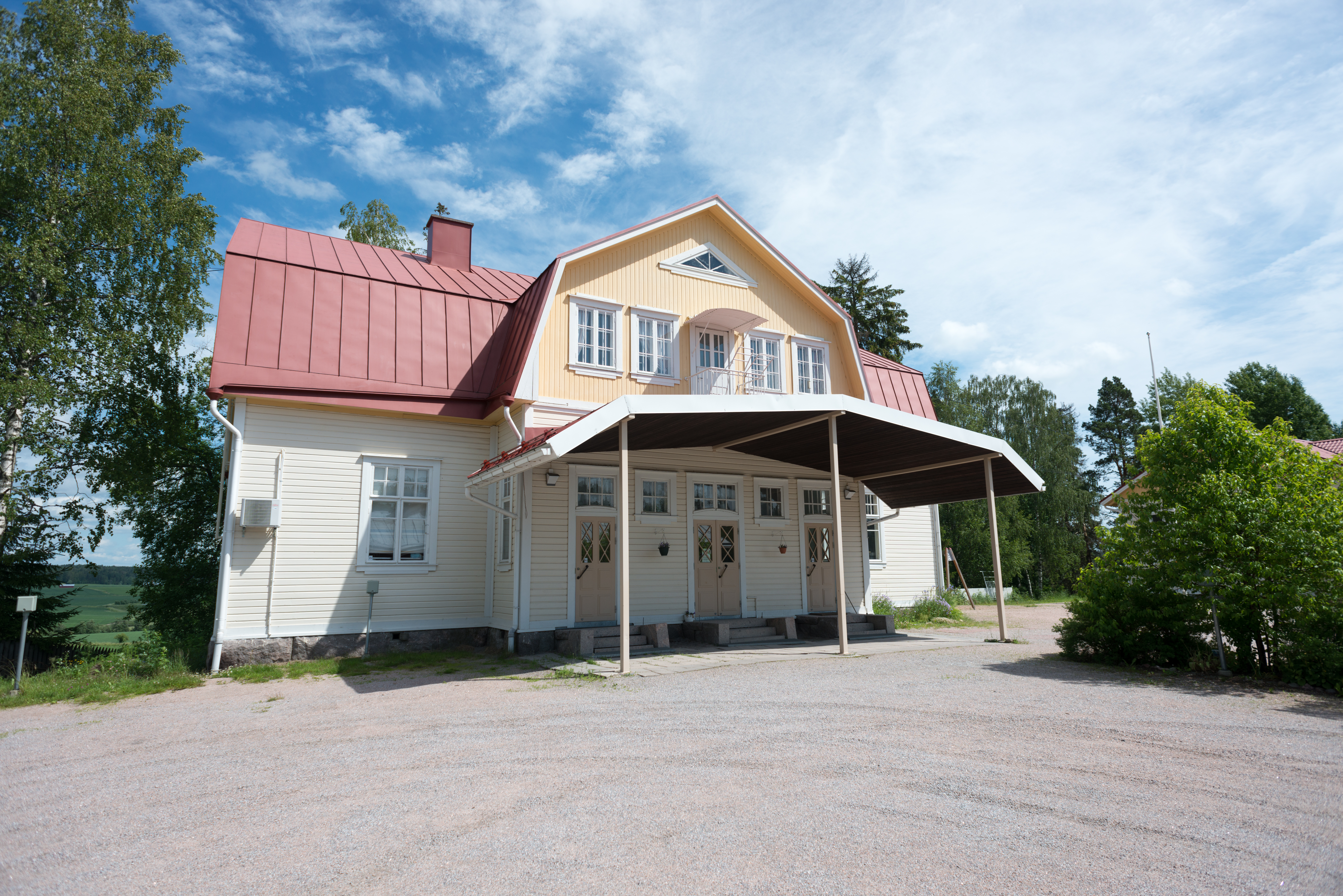 Hajalan koulu Salossa